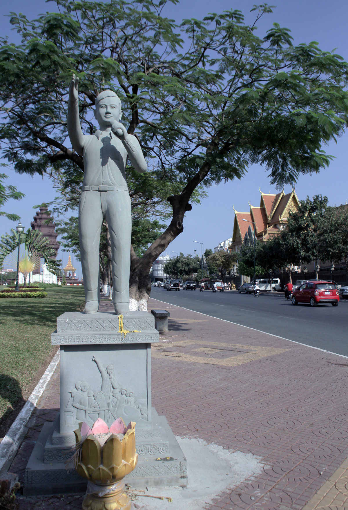 Monumento a Chea Vichea en Phnom Penh, en Sihanouk Blvd, estatua